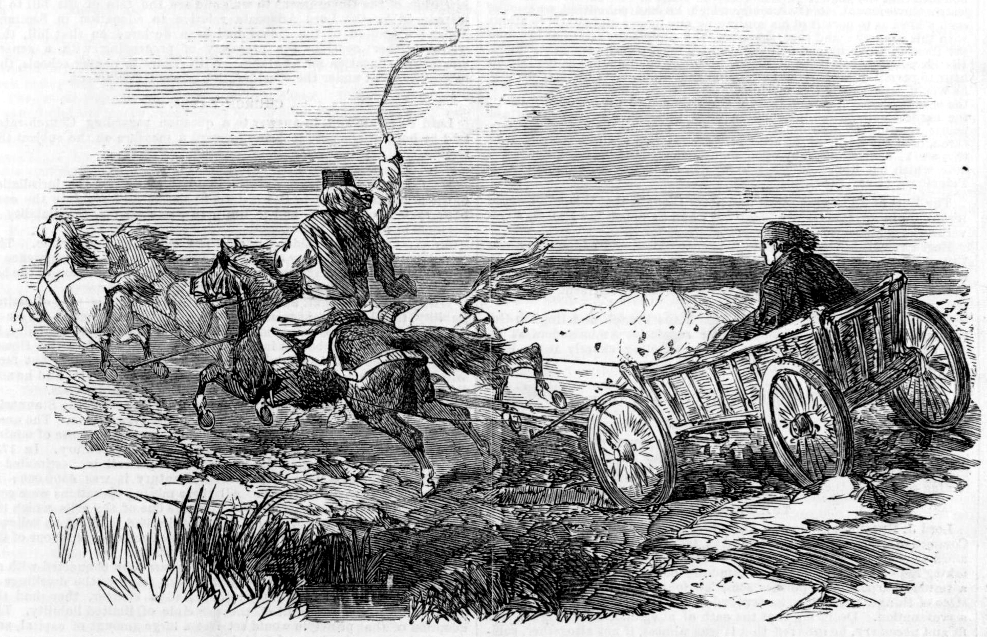 Araba of Little Wallachia, 1854 Араба или арба из Малой Валахии, 1854 год.